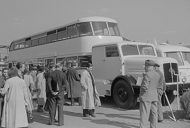 Original image description from the Deutsche Fotothek Besucher vor einem Bus auf dem Ausstellungsgelände der Technikmesse (Fahrzeuge)